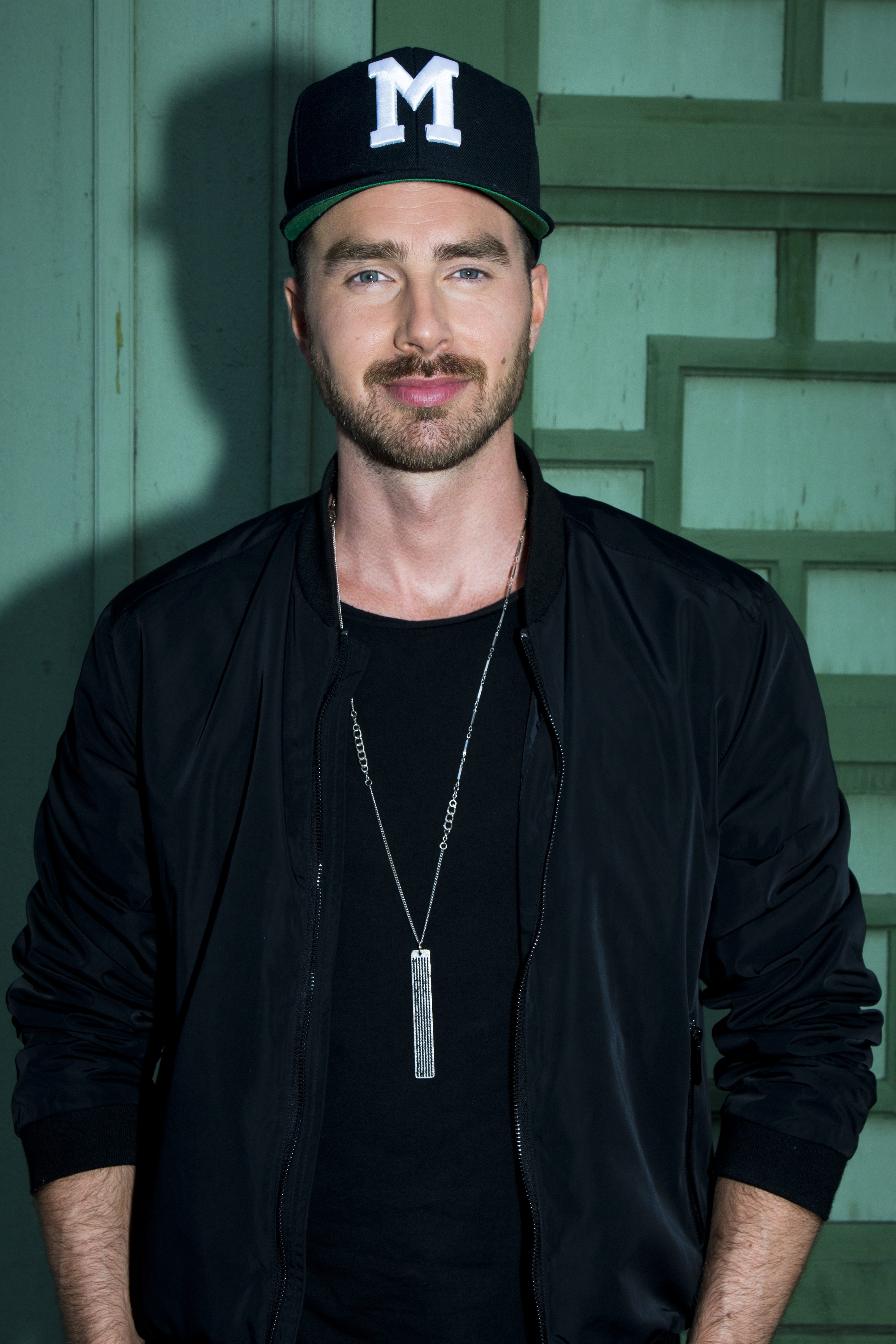 Mattias Andréasson på Sommarkrysset, Gröna Lund i Stockholm